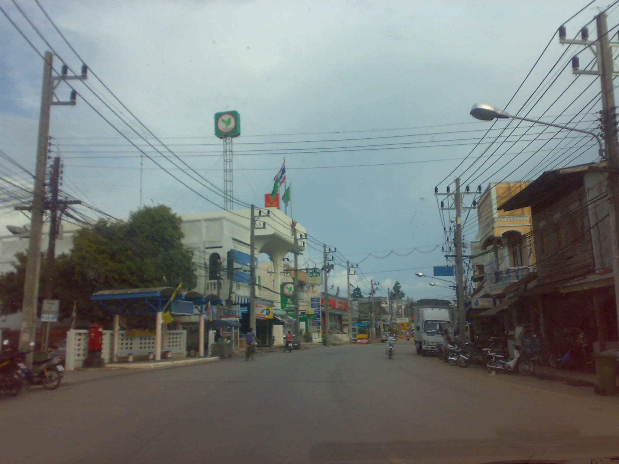 Thai Mueang, Phang Nga, Thailand